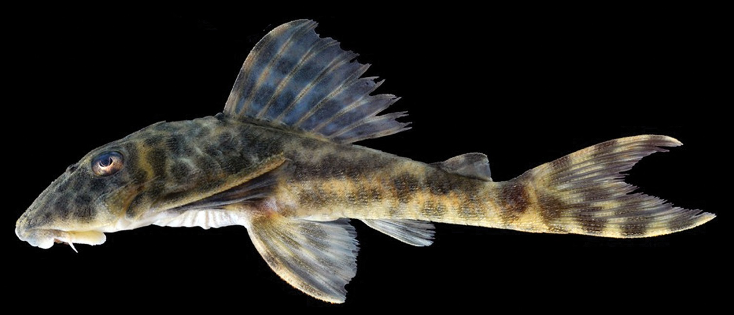 Peckoltia lujani, río Orinoco, Brasil. Armbruster JW, Lujan NK (2016) A new species of Peckoltia from the Upper Orinoco (Siluriformes, Loricariidae). ZooKeys 569: 105-121.